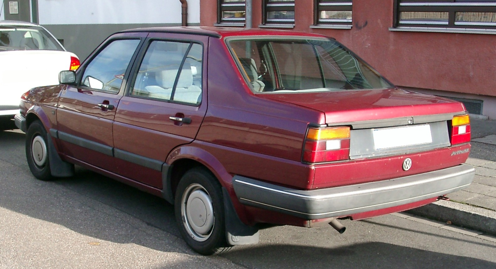 VW Jetta